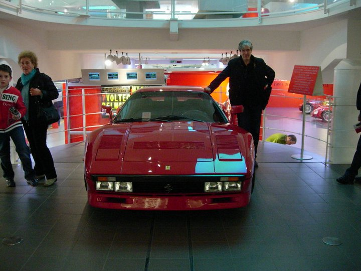 Nicosia con una sua creatura